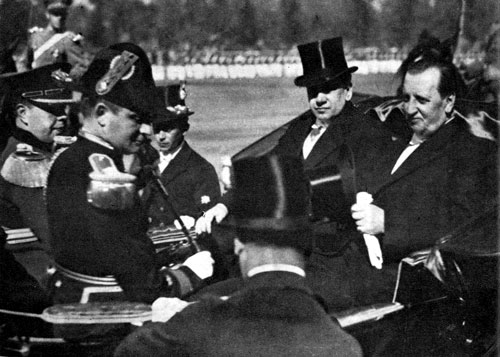 Arturo Alessandri Palma, Presidente de Chile. Fotografía junto al ministro de Estado Emilio Bello en una revista militar en el Parque Cousiño, 1935?.